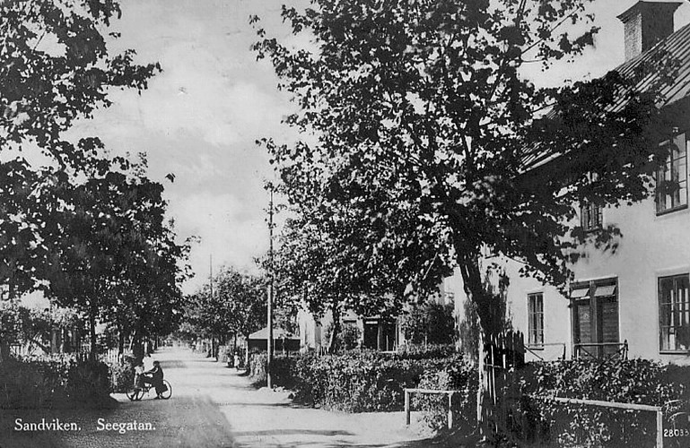 Bruksbostäder vid Seegatan i Sandviken